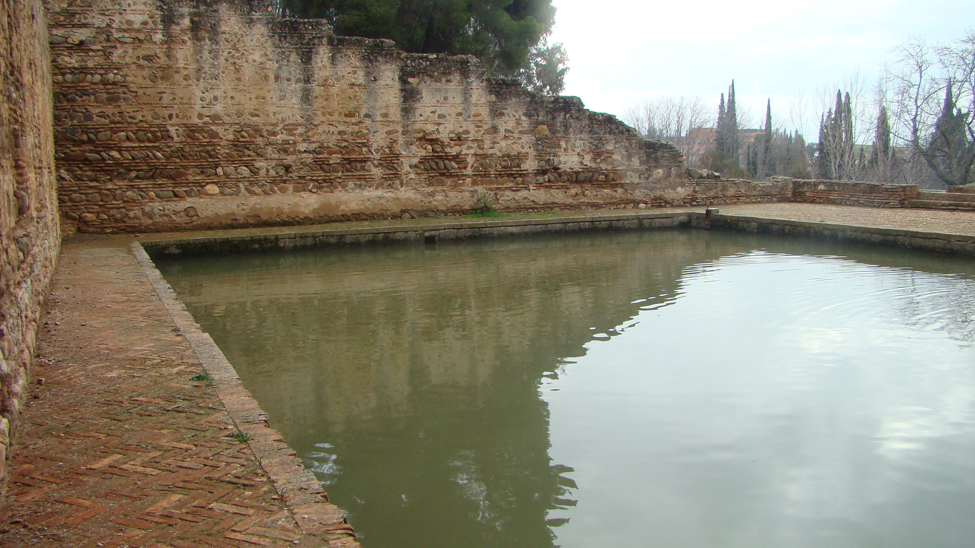 Baño de las Damas, en el paraje de Los Albercones (Granada)